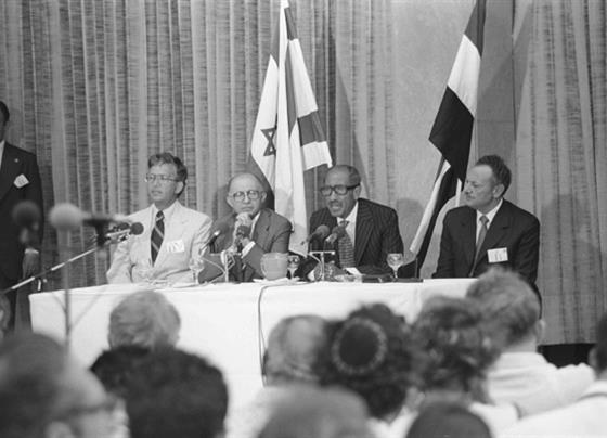 ביקור הנשיא המצרי אנואר סאדאת בחיפה. הנשיא המצרי וראש ממשלת ישראל, מנחם בגין, בשולחן הכבוד